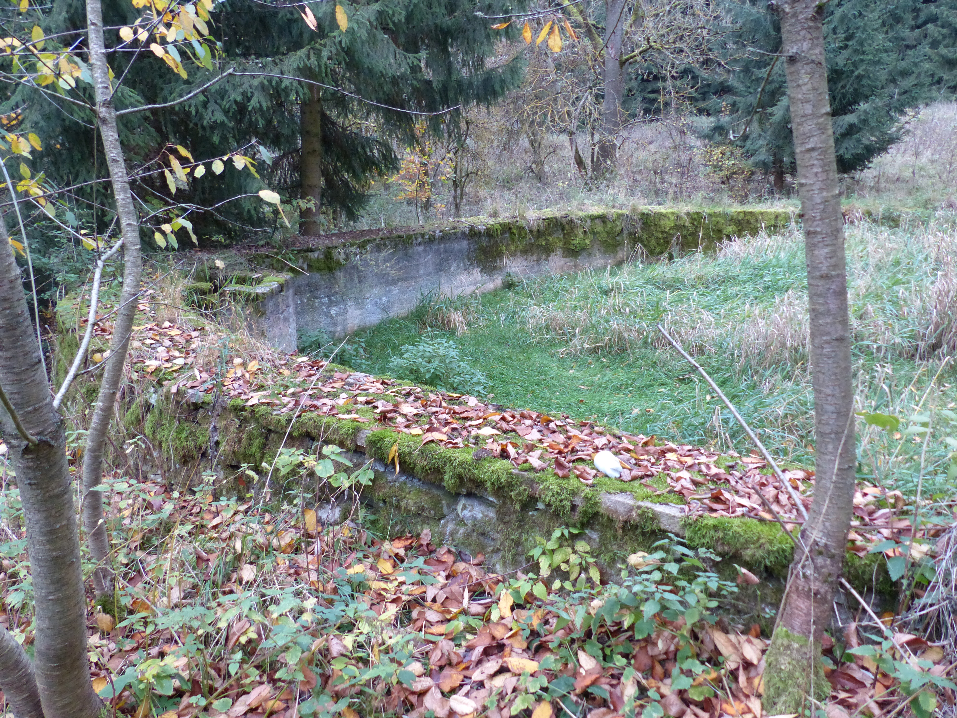 Bilderserie Wüstung Ebersberg mit Ortsansichten, Mauerresten, verbliebenen Bäumen